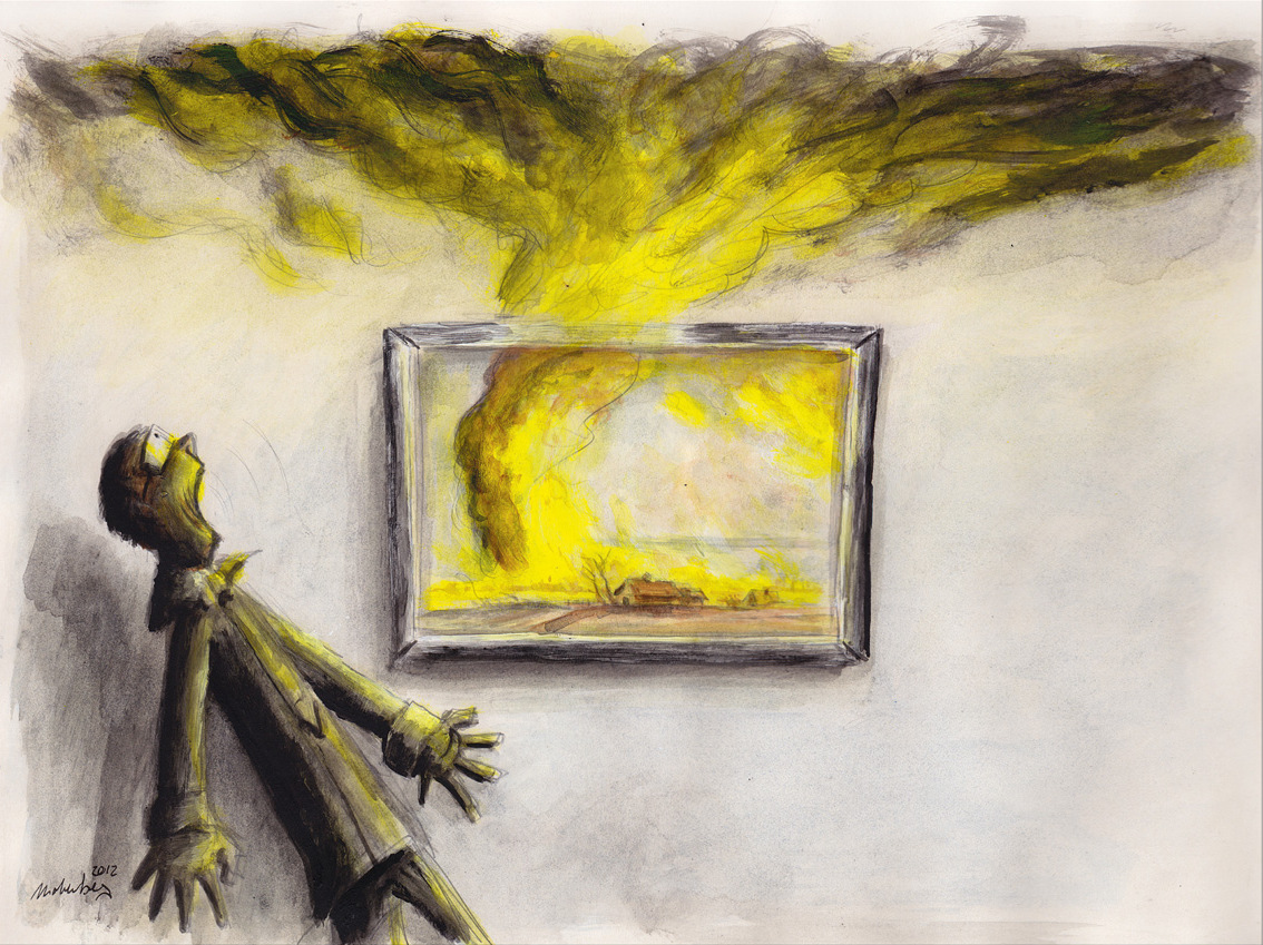 Bombenangriff auf Braunschweig am 15. Oktober 1944: Karikatur FEUER von Achim Mohrenberg zum Streit über das Gemälde Das brennende Braunschweig des NS-Künstlers Walther Hoeck.